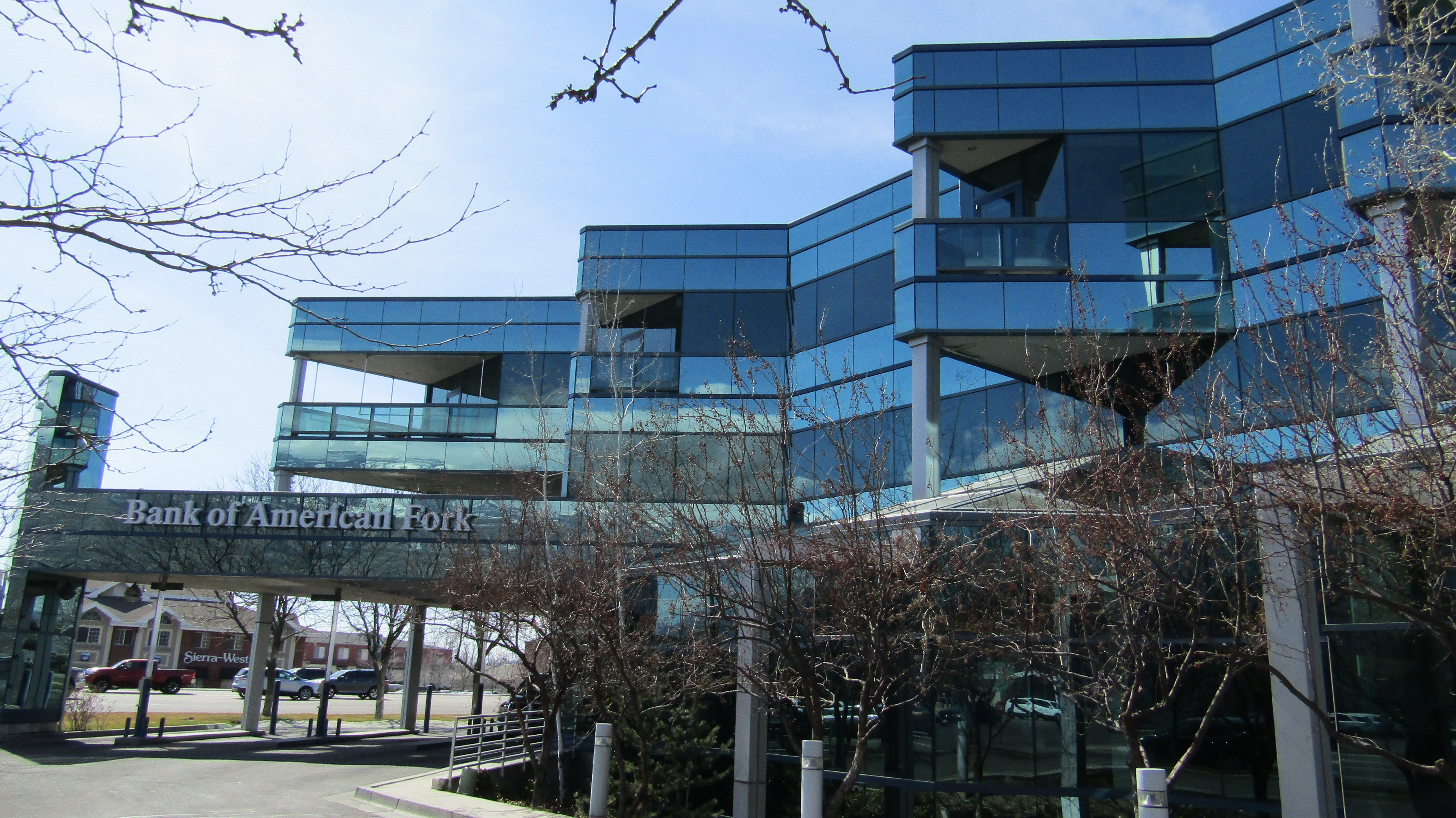 Bank in Orem, Utah.